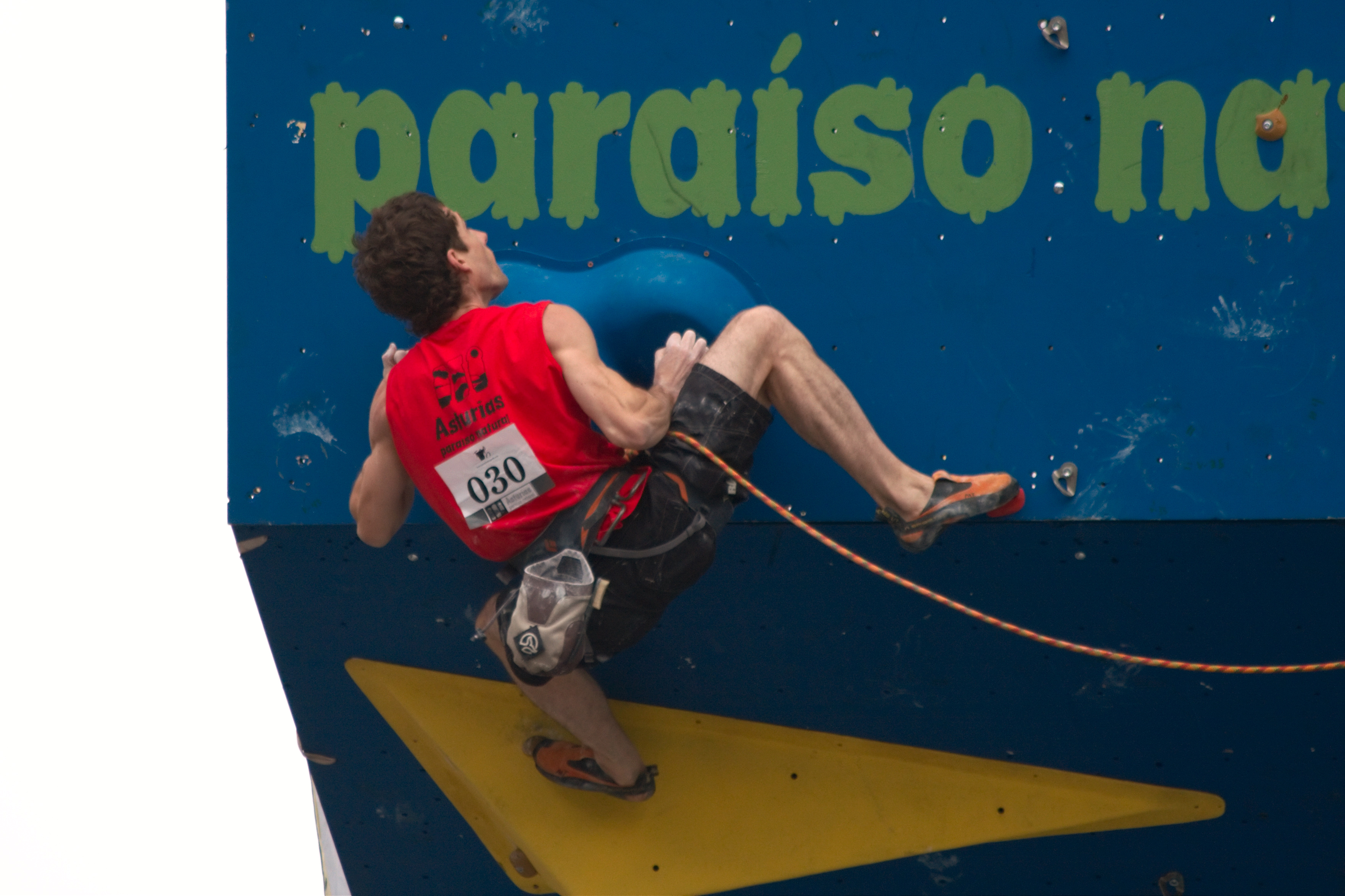 A Coruña, 26 de Junio de 2010